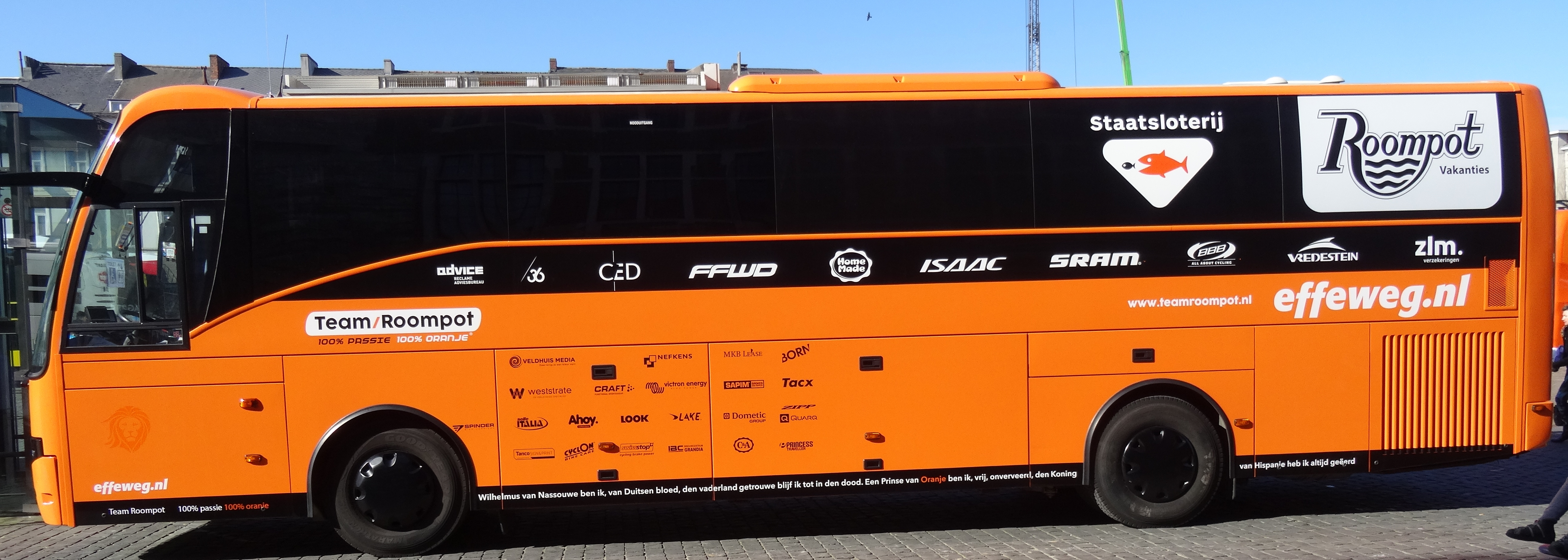 Reportage réalisé le samedi 28 février à l'occasion du départ et de l'arrivée du Circuit Het Nieuwsblad 2015 à Gand, Belgique.